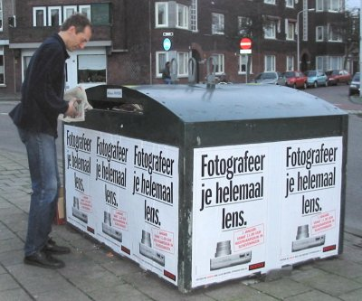 Papierbak, eigen foto, persoon gaf toestemming voor publicatie